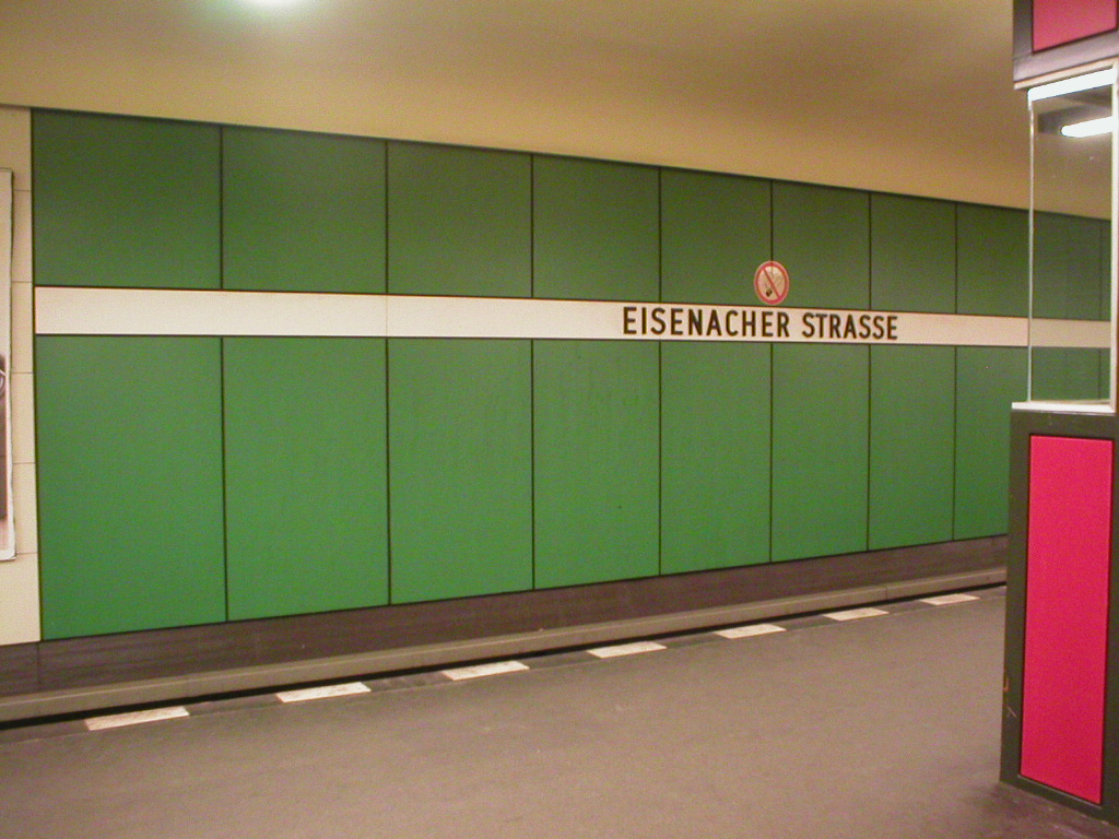 U-Bahn Berlin Eisenacher Straße